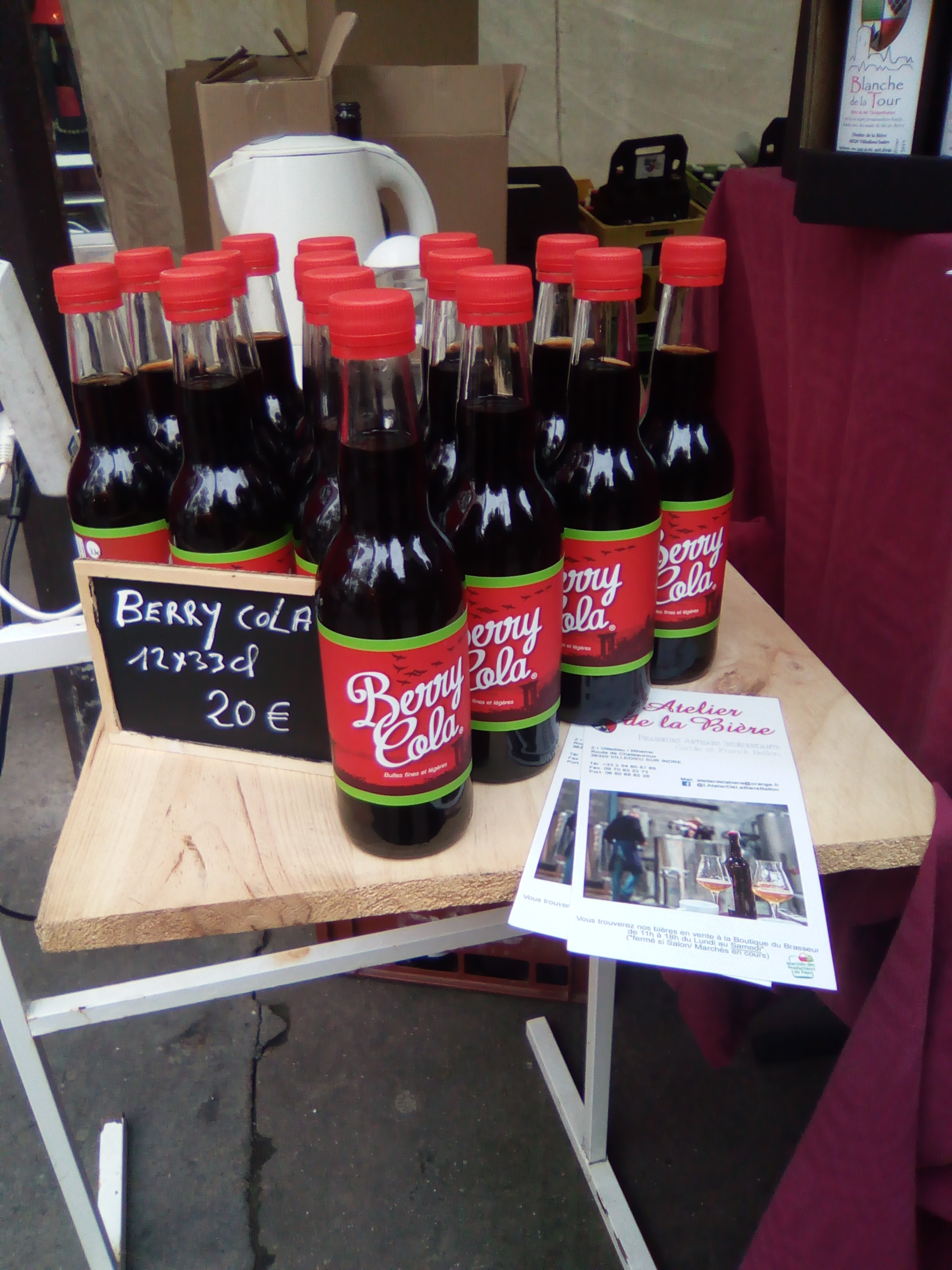 Stand de "Berry cola" au marché des producteurs de pays, boulevard de Reuilly.